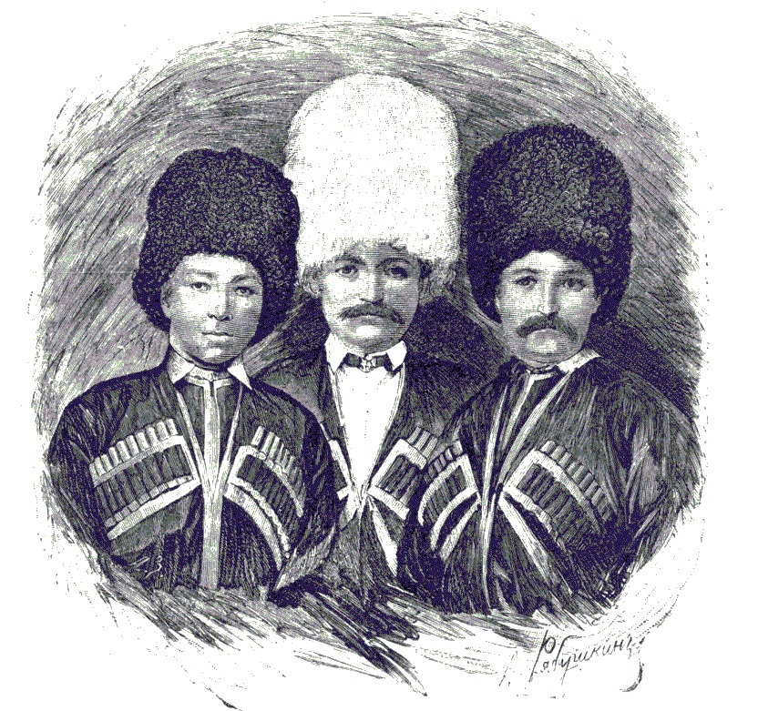 Dadeshkeliani, nobles of Svaneti: Tsiokh (Mikhail), Tengis (Nikolay) and Islam.